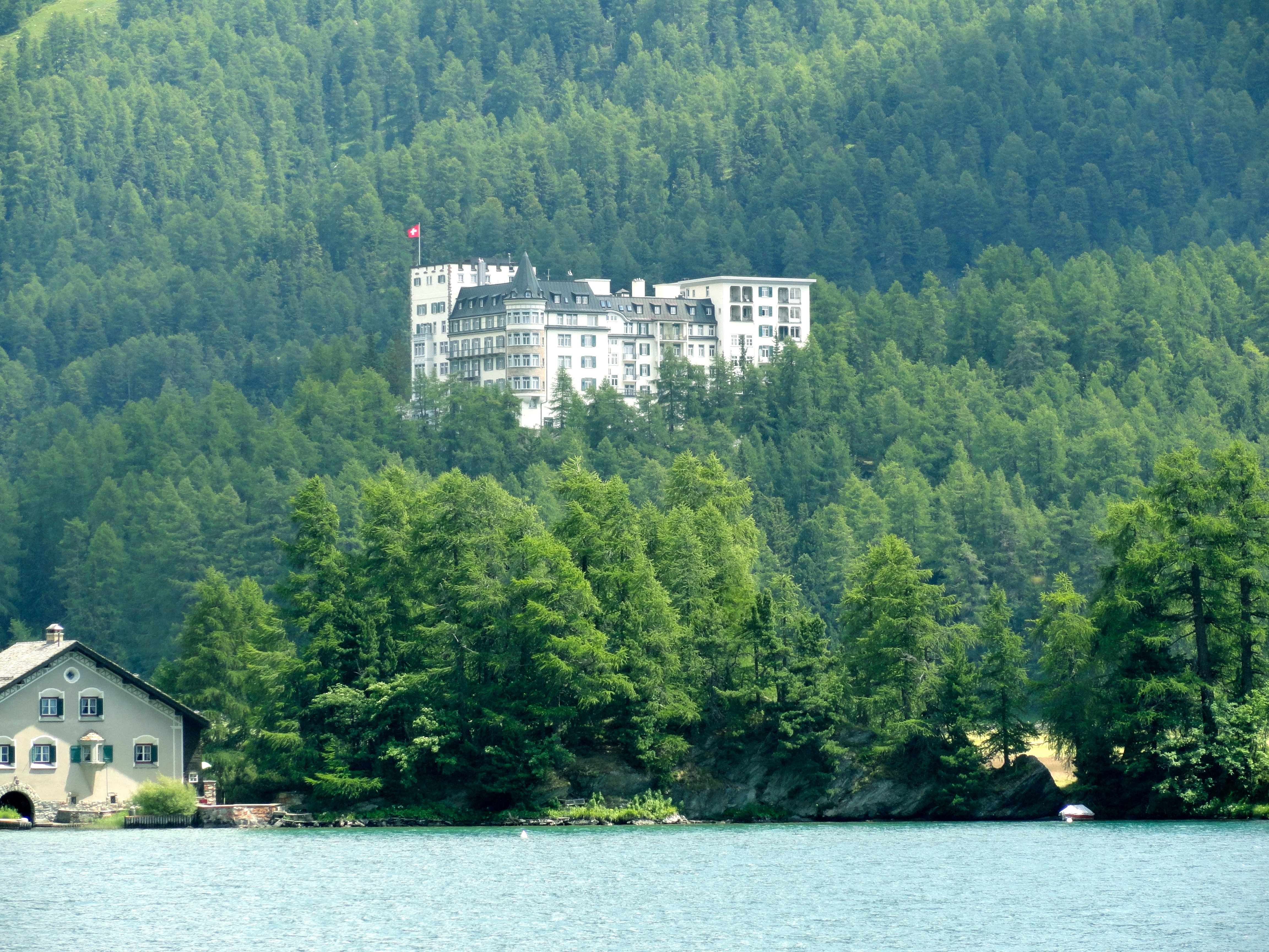 Hotel Waldhaus Sils Maria - Westseite